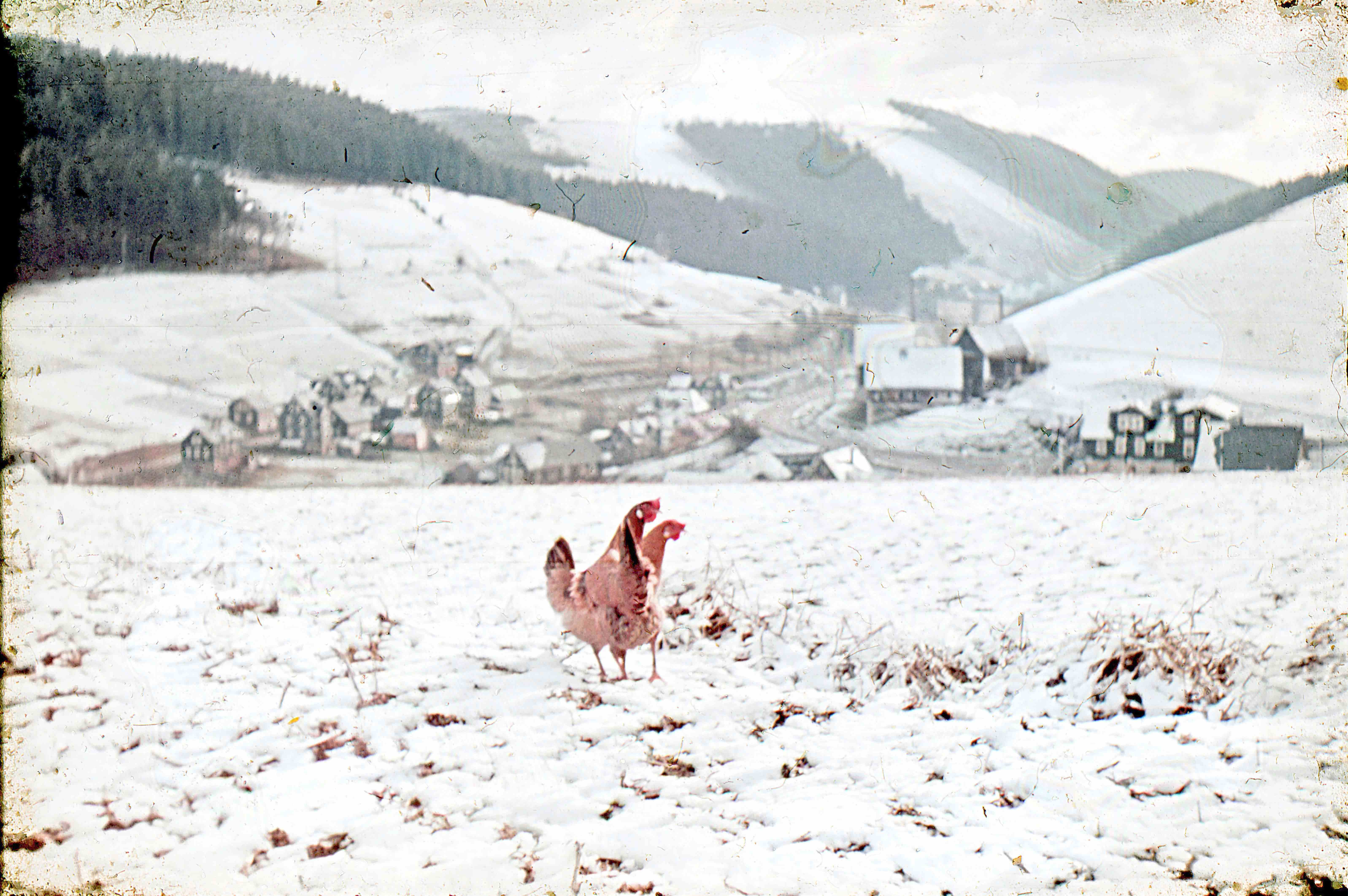 Dia auf Agfa-Farbfilm Anfang der 1940er Jahre: Hinter Glas. Bildfehler: eingedrungener Staub, Newtonringe, Emulsion teilweise beschädigt Hühner auf einem Feld im Winter bei Haselbach (jetzt Ortsteil der Gemeinde Oberland am Rennsteig)